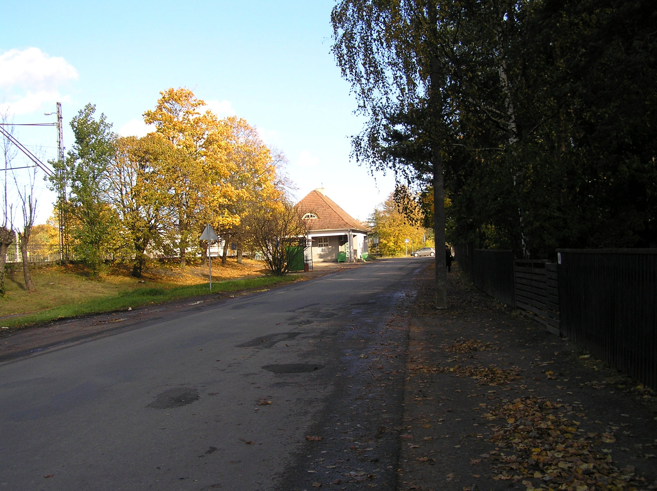 Vaade Raudtee tänavale Hiiu jaamahoone suunas